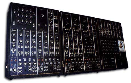 sintetizzatore Moog 3P (Moog Modular)